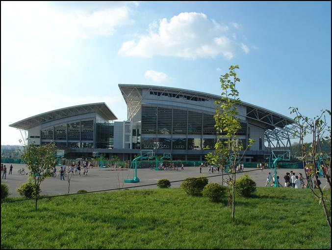 中文（香港）: 南京中医药大学體育中心後門